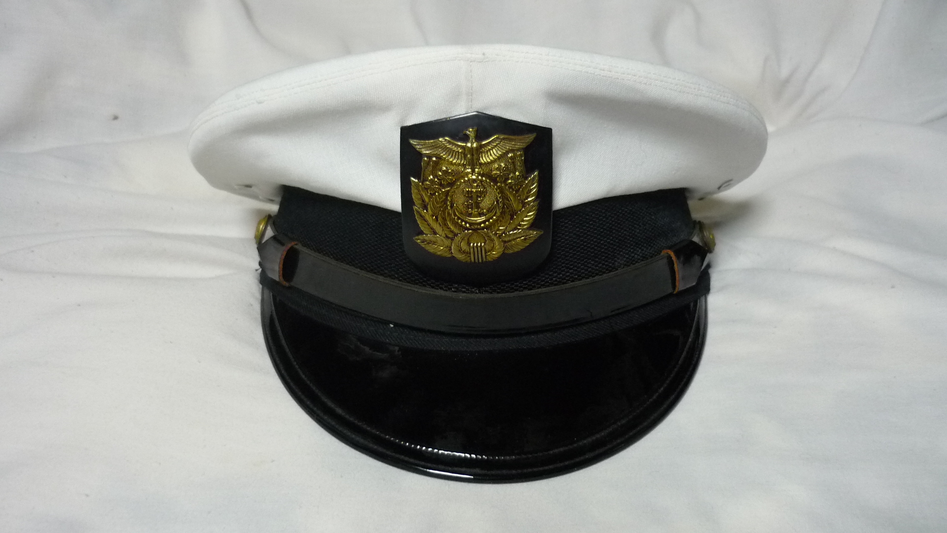 警備隊から海上自衛隊1970年までの海曹正帽